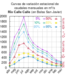 Curvas de variación estacional del río Calle Calle en Balsa San Javier. # Dirección General de Aguas # Diagnóstico y clasificación de los cursos y cuerpos de agua según objetivos de calidad. Cuenca del río Valdivia. # Santiago de Chile # Ministerio de Obras Públicas (Chile) # 2004 # url: # urlarchivo: # Tabla 4.6: Río Calle Calle en balsa San Javier (m3/s) pág. 50 mes 5% 10% 20% 50% 85% 95% abr 499.61 399.32 304.40 181.21 95.65 65.72 may 1201.93 953.06 719.58 420.56 217.04 147.16 jun 1480.32 1348.25 1188.27 882.52 505.92 284.71 jul 1976.49 1692.25 1396.04 949.56 562.07 395.59 ago 1289.70 1146.76 994.66 757.83 542.13 445.30 sep 972.07 873.67 771.09 616.15 478.52 416.07 oct 819.52 729.97 634.51 485.40 348.99 287.50 nov 707.13 637.40 559.18 426.82 290.50 222.16 dic 636.62 551.12 461.99 327.36 207.77 153.51 ene 473.09 399.09 324.79 219.07 134.88 101.44 feb 302.74 267.24 227.77 163.01 101.81 74.55 mar 250.52 219.54 187.10 137.84 94.60 75.84 This plot was created with Gnuplot.